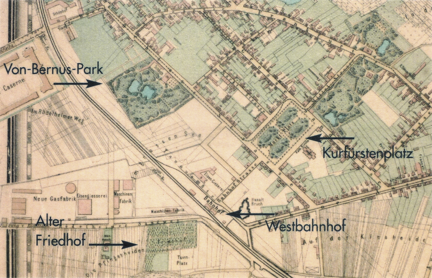 Frankfurt am Main, Stadtteil Bockenheim: Der Alte Friedhof Bockenheim ist ein von 1825 bis 1898 für Begräbnisse genutzter Friedhof, der im Jahr 1916 zu einer öffentlichen Grünanlage umgewidmet wurde. Die Datei zeigt einen Lageplan des westlichen Bockenheims aus dem Jahr 1873. Westlich des Westbahnhofs Betriebsgelände der FMA Frankfurter Maschinenfabrik AG, vormals Pokorny & Wittekind, nachmalig DEMAG AG, heute gewerbliche Immobilienvermietung. In westlicher Nachbarschaft wurde das Betriebsgelände der englichen ICAG, des nachmaligen Bockenheimer Gaswerks, aus der die Mainova hervorging, markiert.